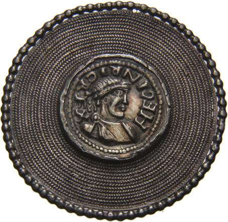 Porträtmedaillon (Heginric-Medaillon), Silber Ostfränkischdeutsches Reich, König Heinrich I. (919-936)